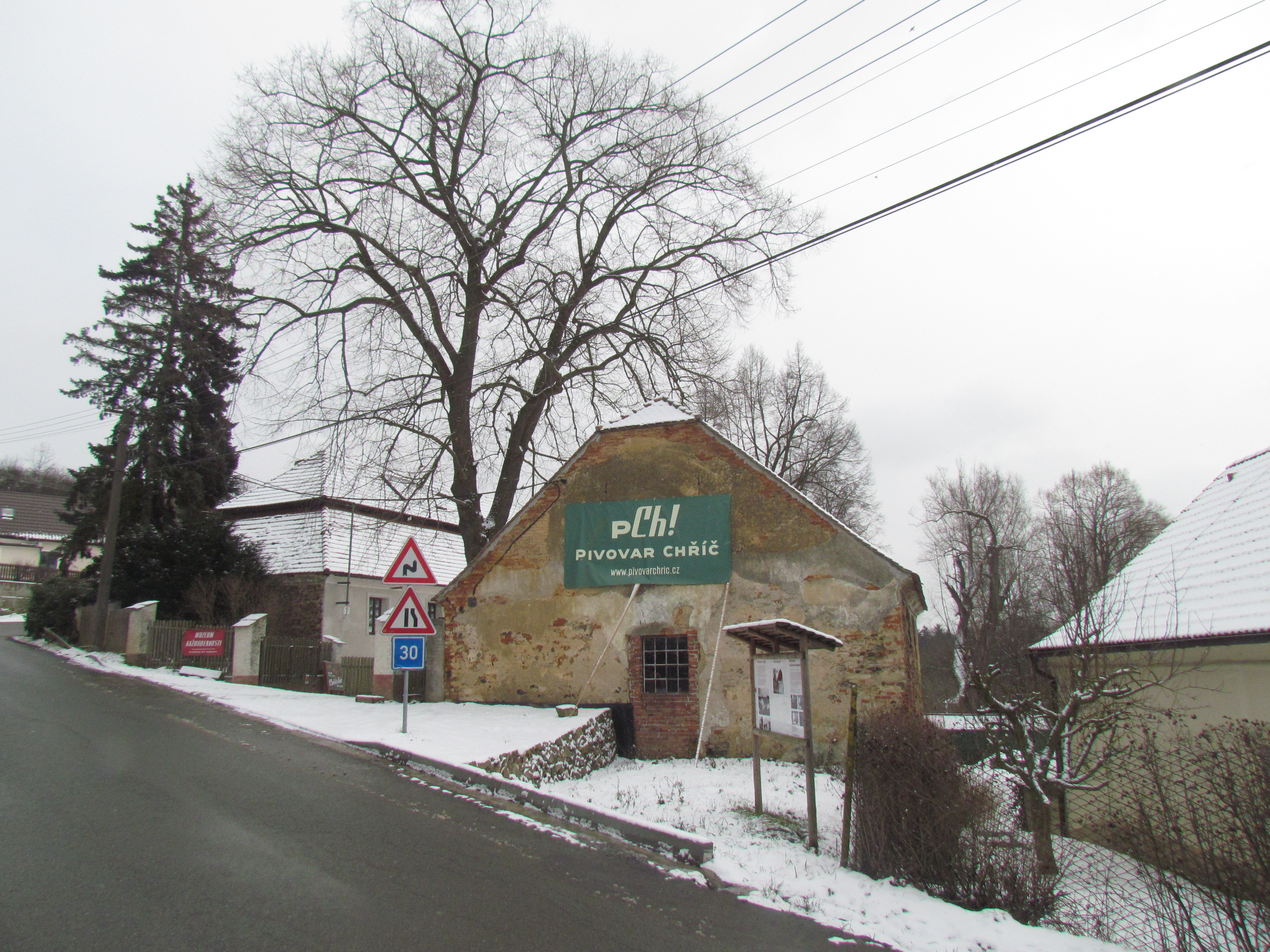 Pivovar